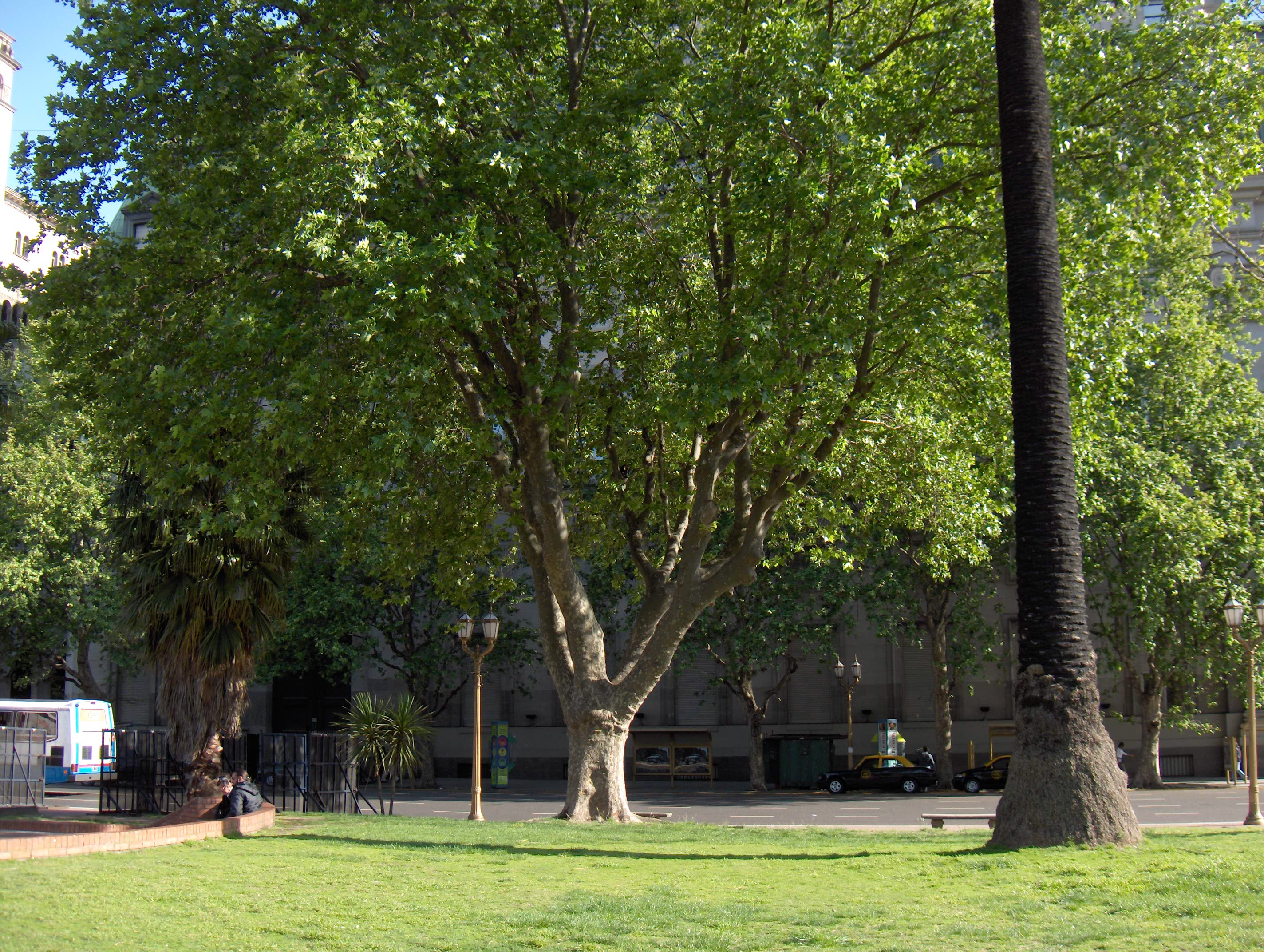 Plátano plantado en la Plaza de Mayo, Ciudad Buenos Aires, Argentina.